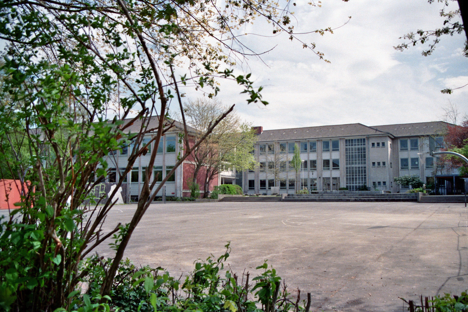 Städtisches Marien-Gymnasium Werl, Schulhof, Nordrhein-Westfalen, Deutschland.